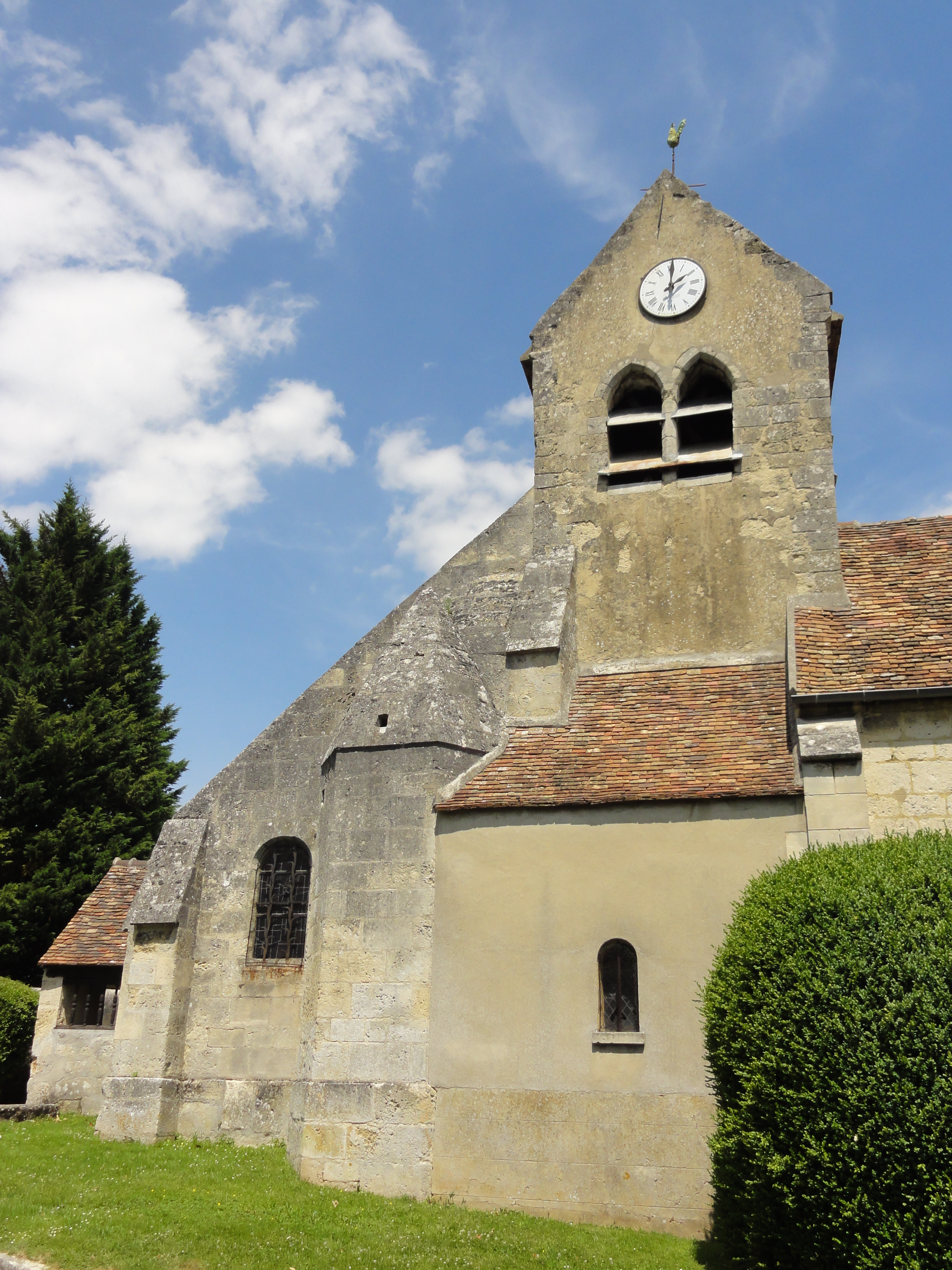 Chapelle latérale sud de la nef et clocher, vue depuis le sud.